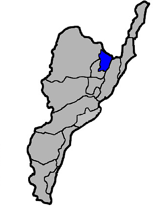 本圖係小籃子為編輯台東縣池上鄉所改繪，感謝KJ提供原圖。